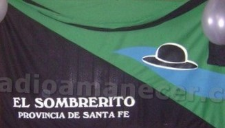 Bandera